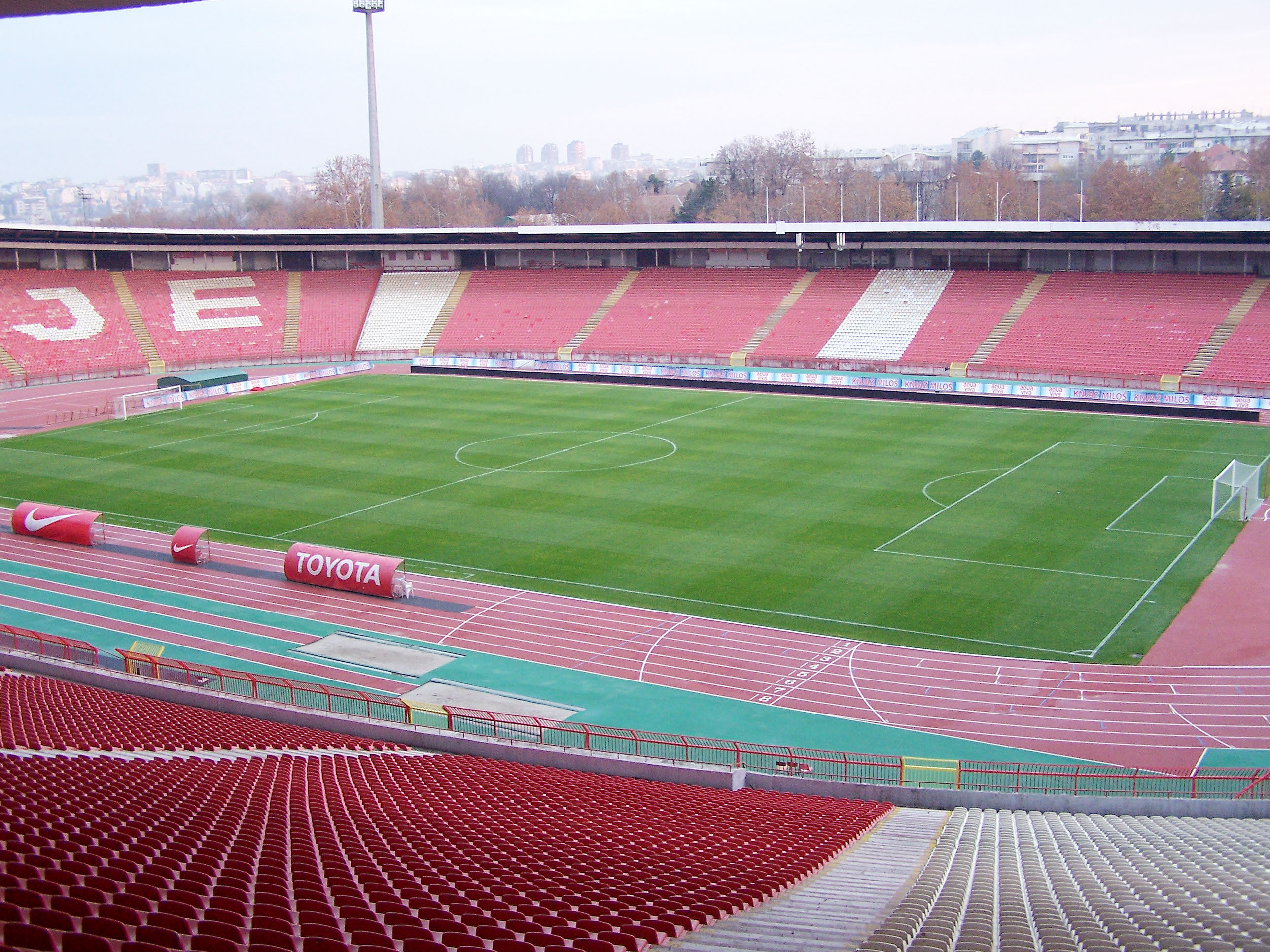 Stadion Crvena Zvezda in Belgrade